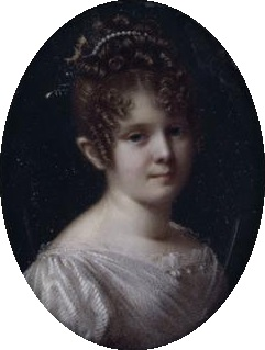 Maria Walewska